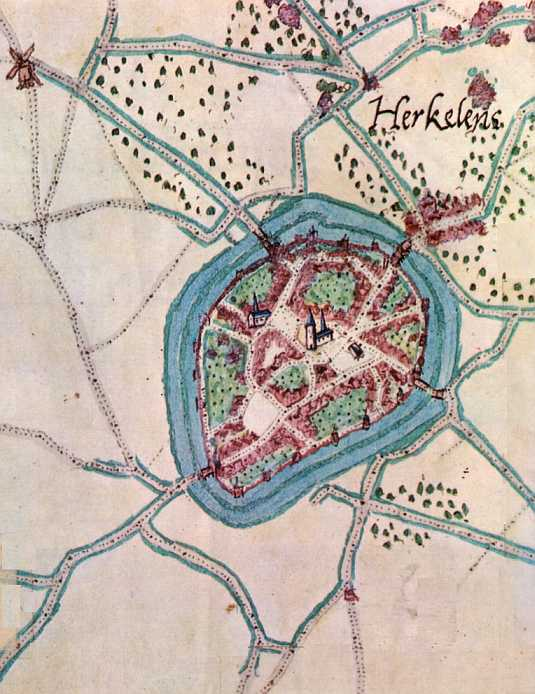 Erkelenz auf einer Karte aus dem 16.Jh. Gut erkennbar sind die vier Stadttore, Marktplatz und Johannismarkt mit Lambertuskirche und Rathaus, Leonhardskapelle, Franziskusplatz und Brückstraße östlich der Stadtbefestigung